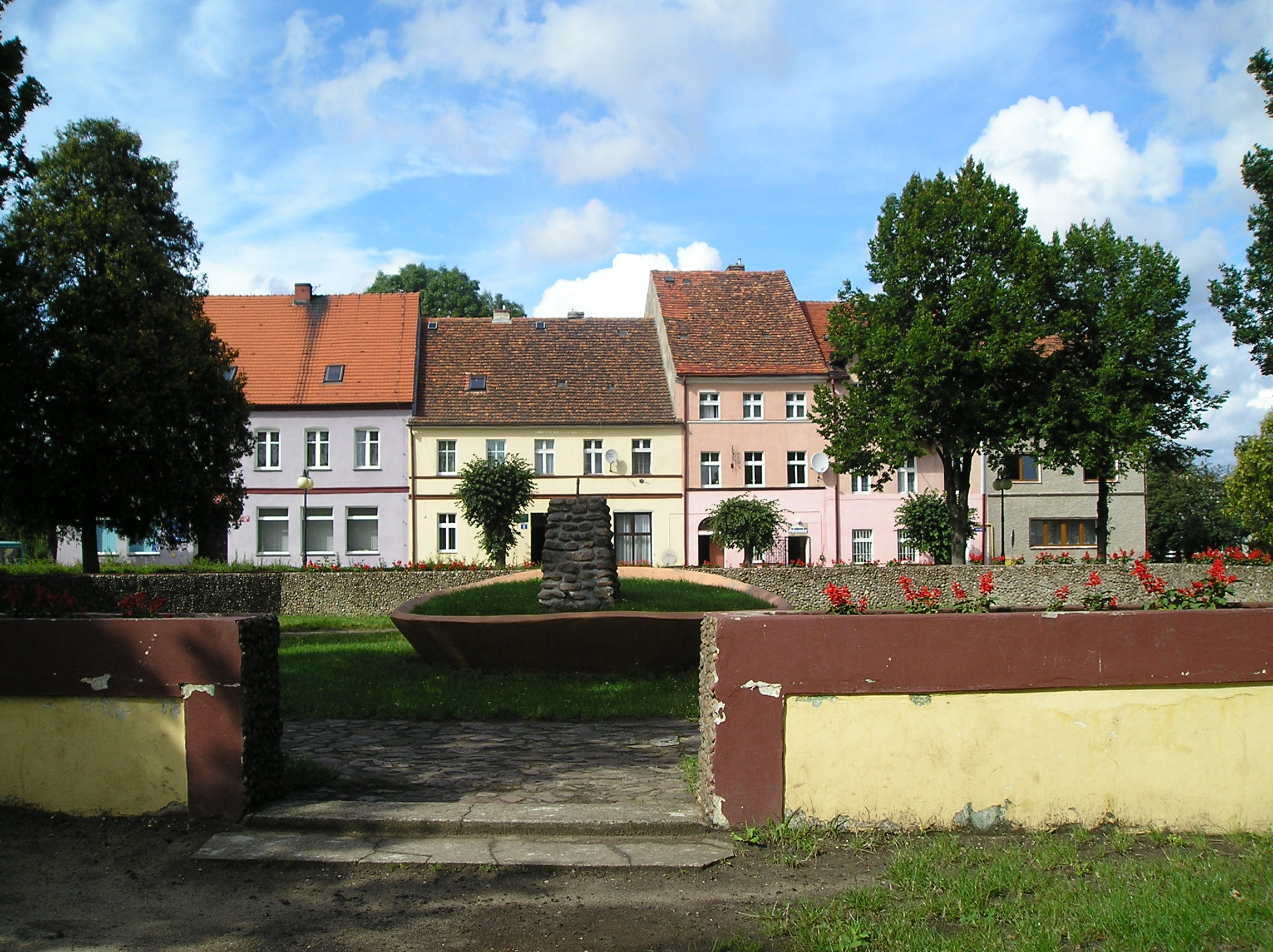 Ruiny zboru w Chobieni